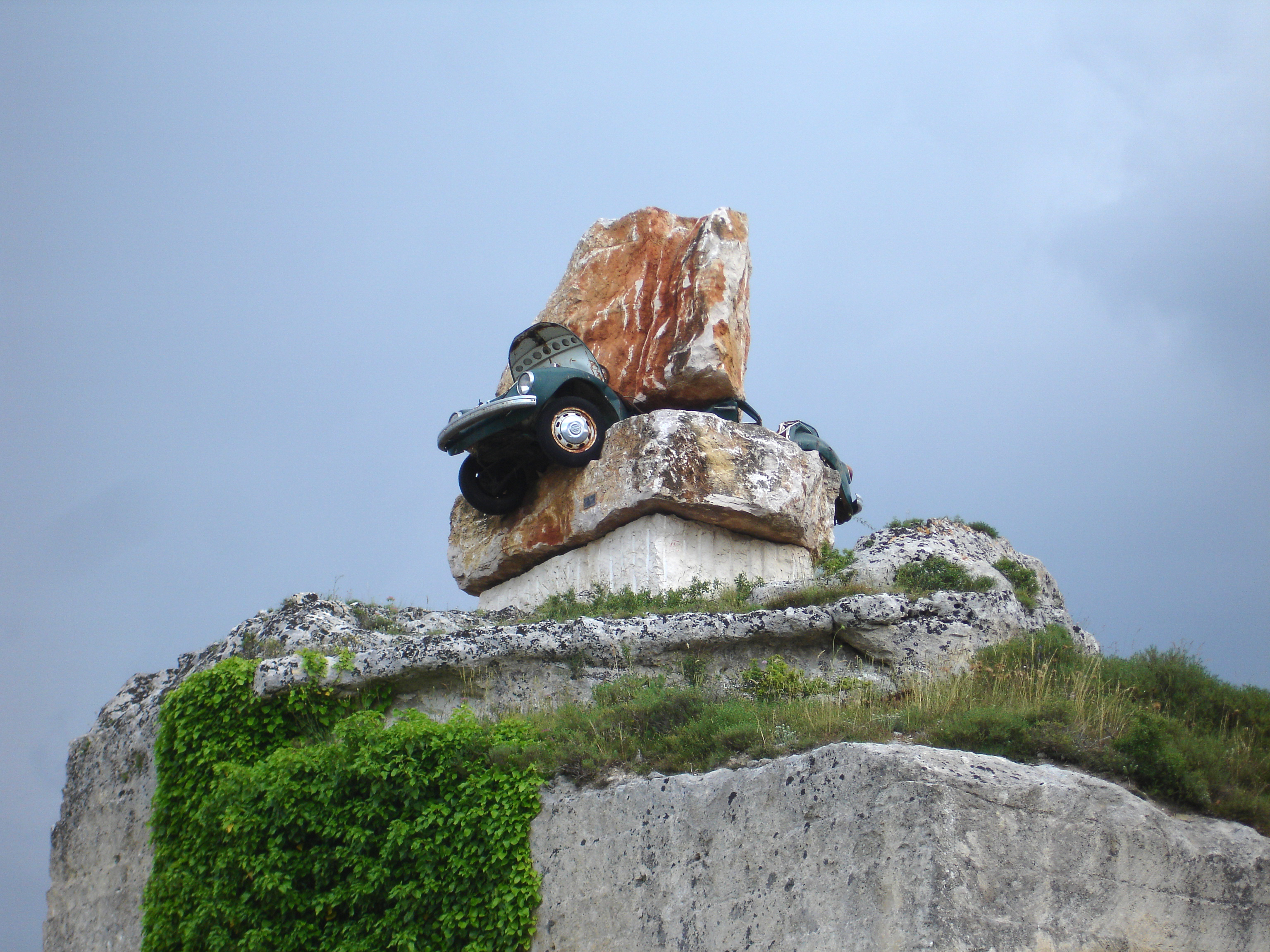 Interpretazione artistica dei Sassi